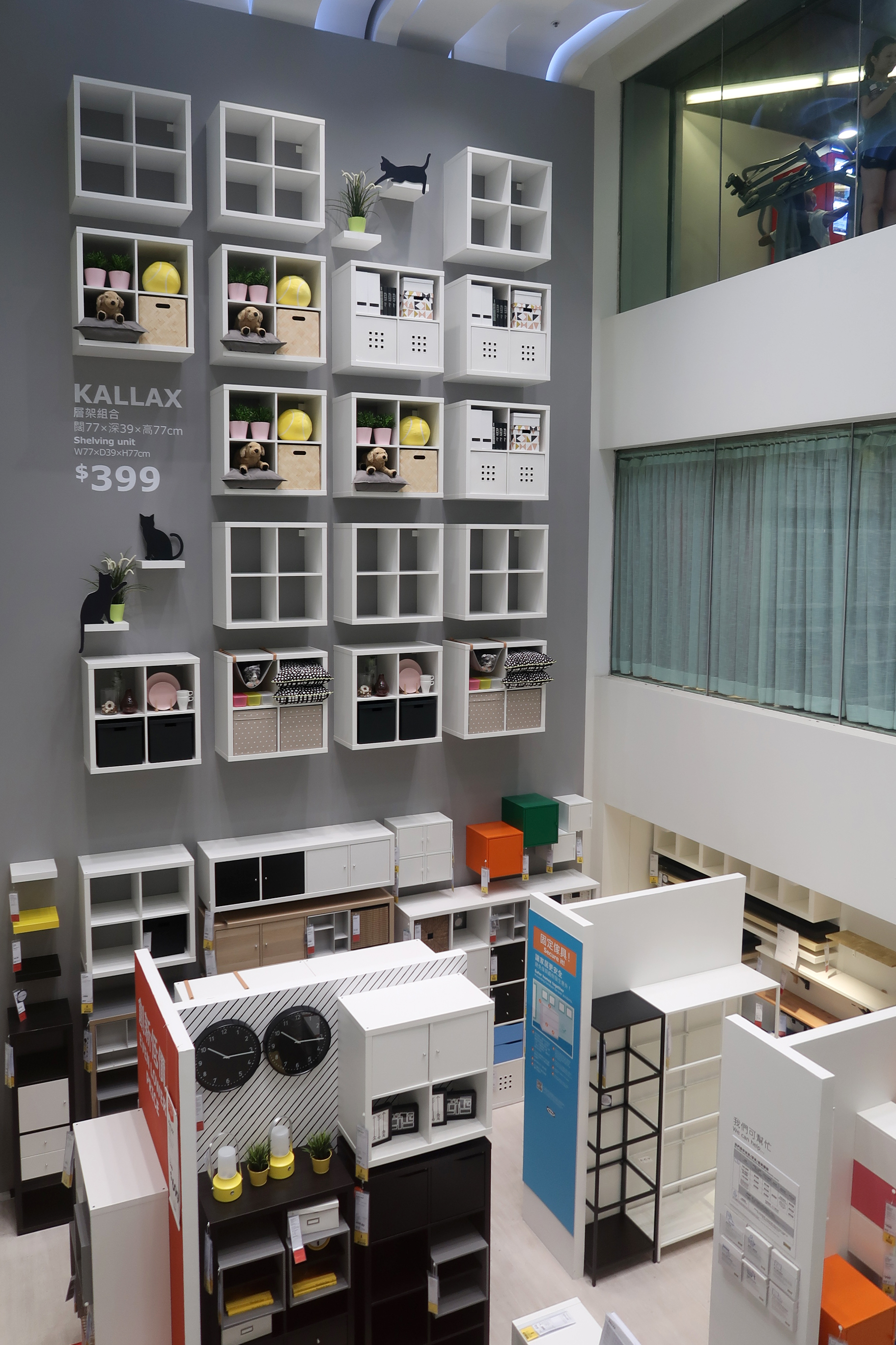 eightandahalf Level 6 Void